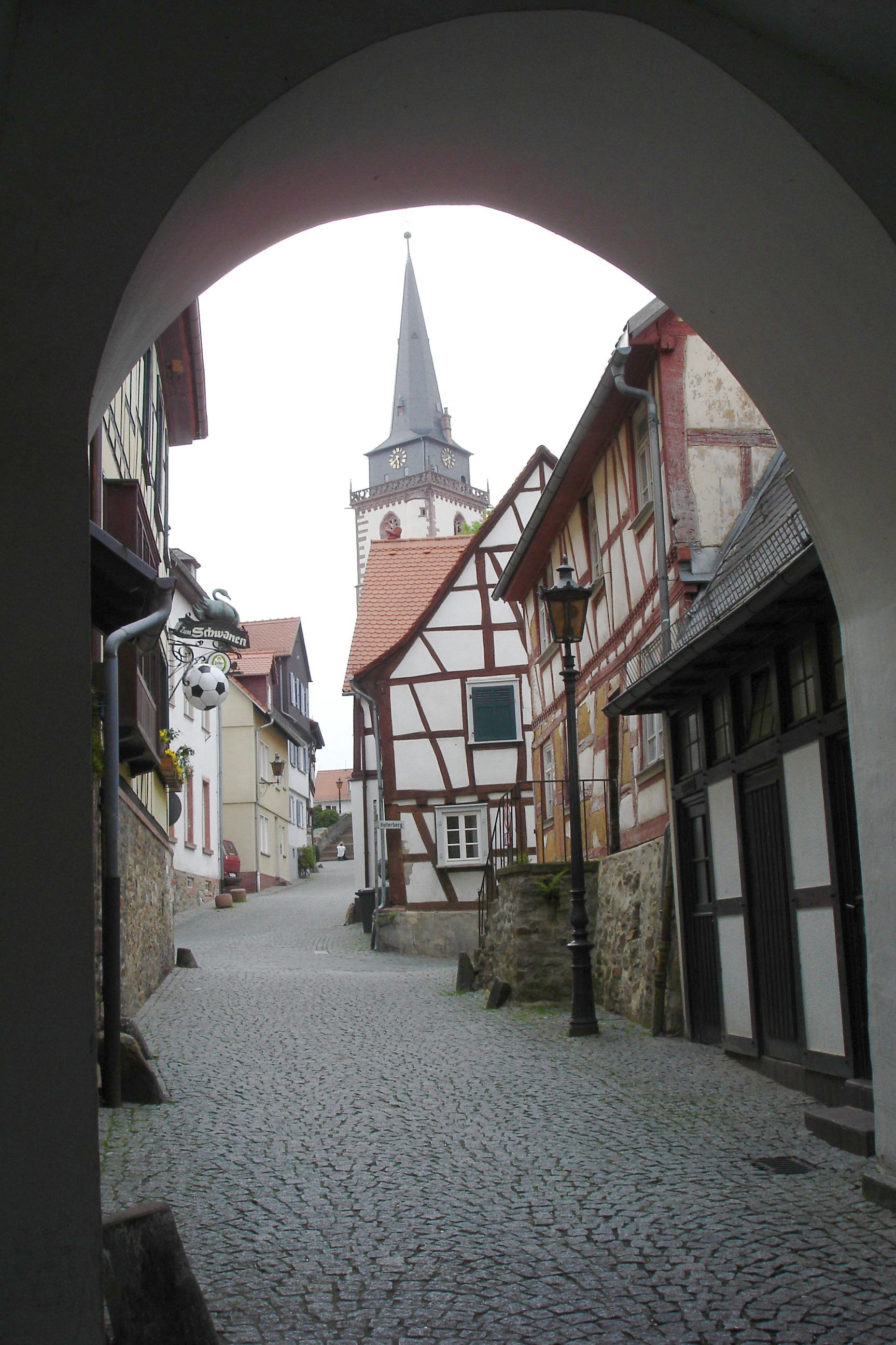 St. Ursula, Oberursel